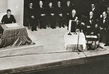 「明治大学創立７０周年記念式典」に臨席する昭和天皇